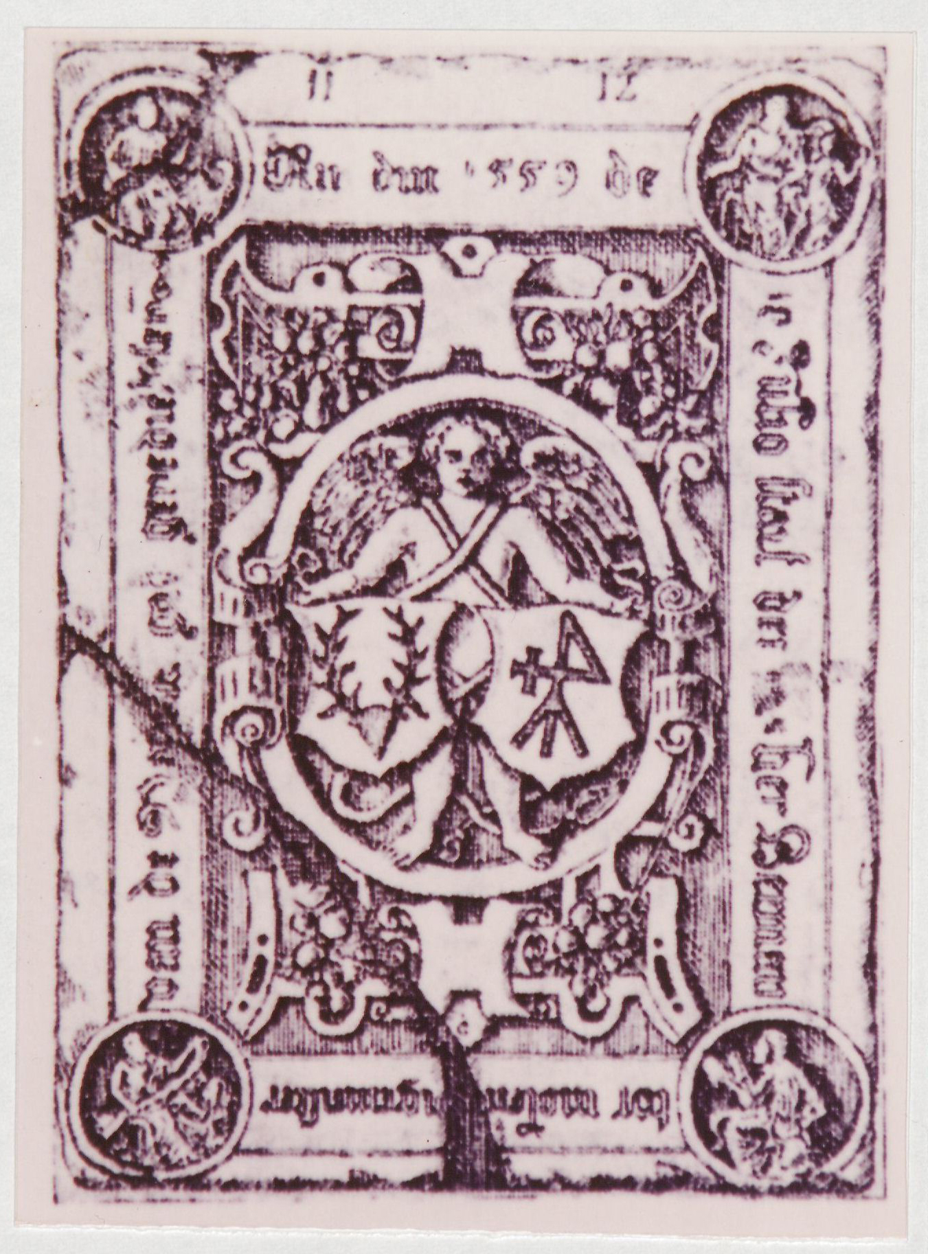 Pierre Tombale de Herman thor Moelen (1505-1559) en l’église Oude Kerk d'Amsterdam. Riche marchand, fondateur de la famille von zur Mühlen dans les Etas Baltes.